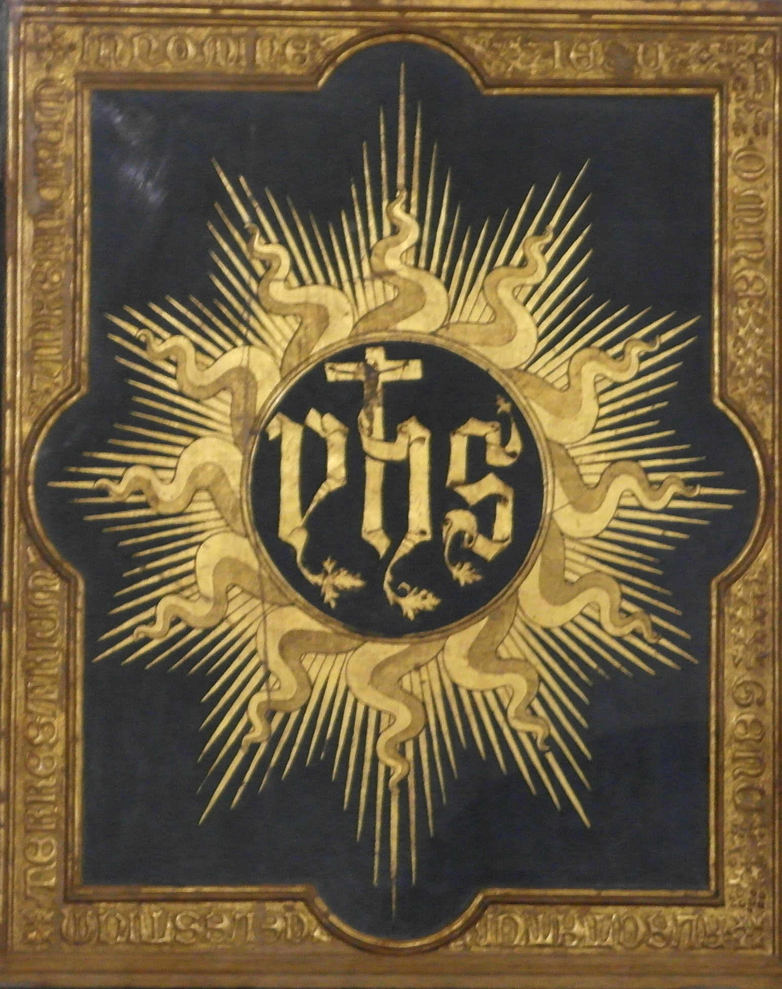 Icona appartenuta a San Bernardino da Siena e custodita nella Chiesa di San Francesco di Prato